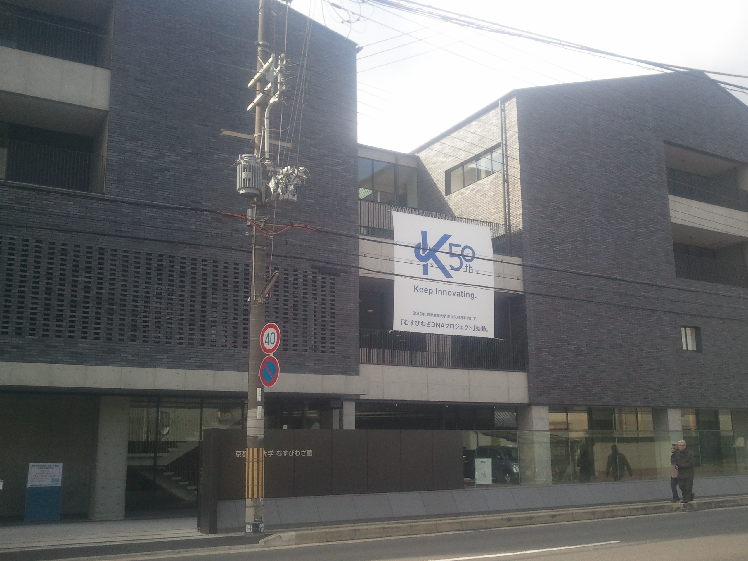 京都産業大学むすびわざ館